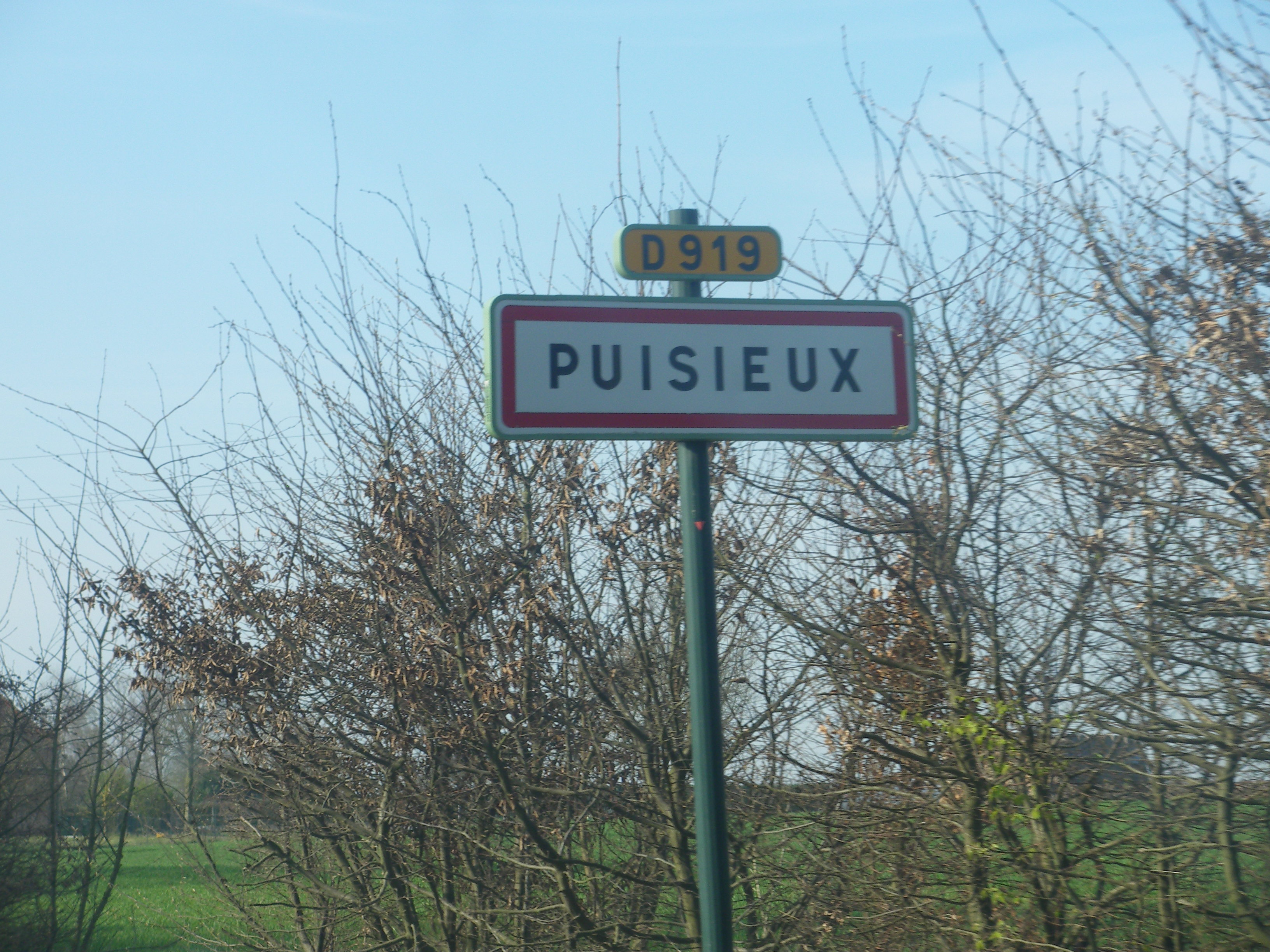 Une entrée de la commune de Puisieux.